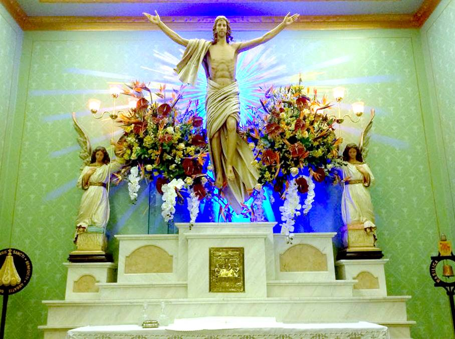 Altar da Capela do Santíssimo - Catedral São Bento